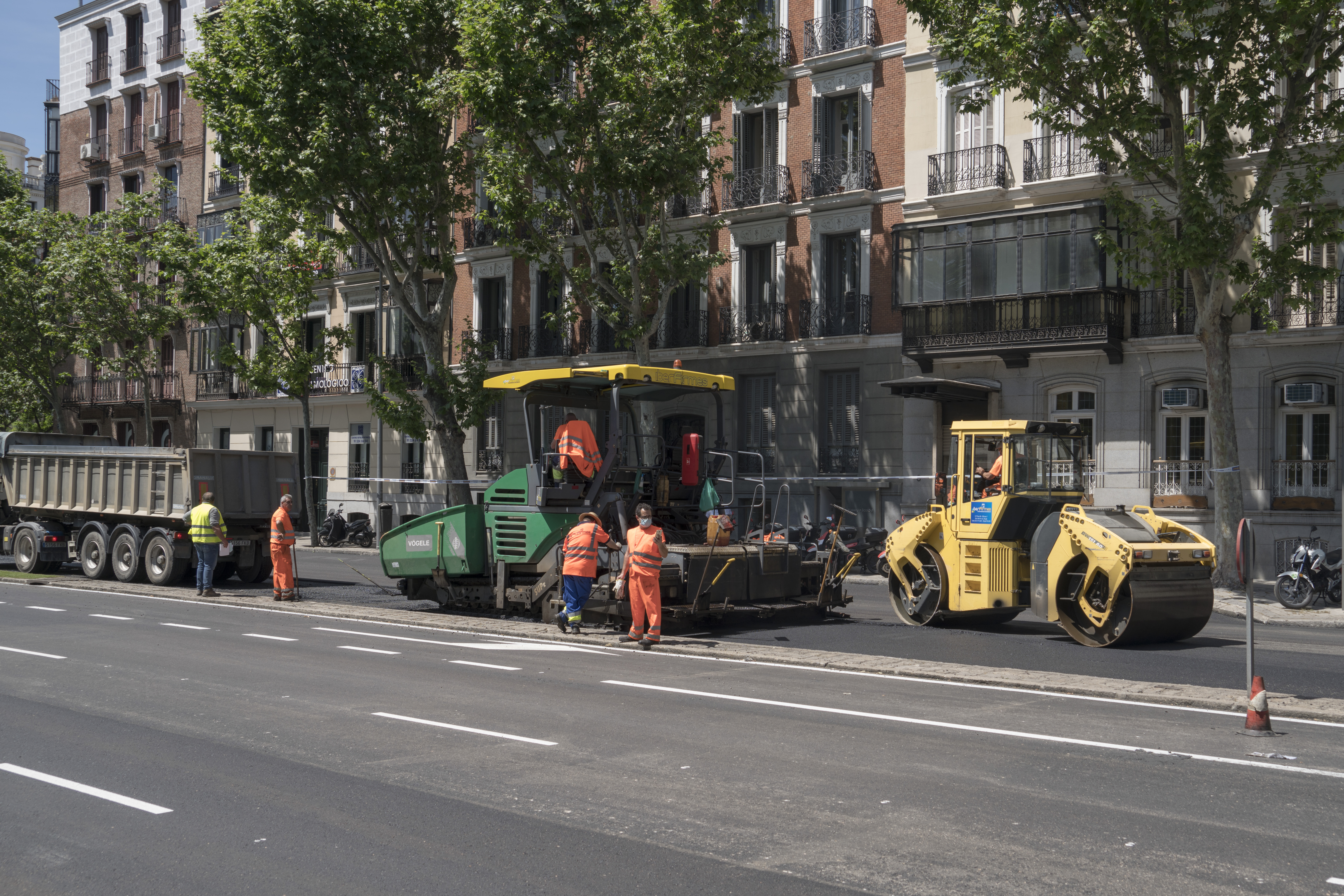 Madrid. Asfaltando. 20 de mayo de 2020